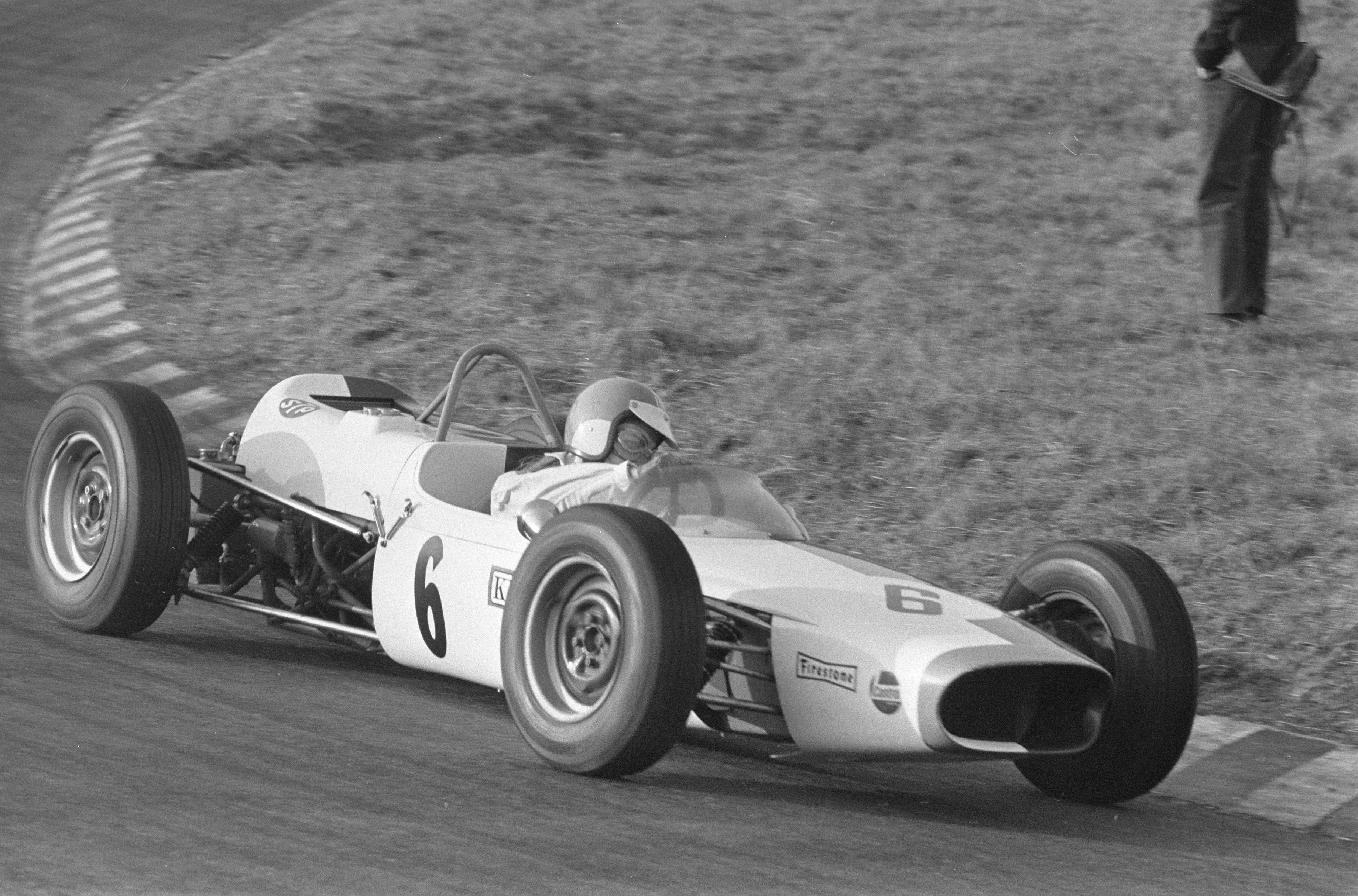 Liane Engeman in actie bij autoraces op Circuit Zandvoort